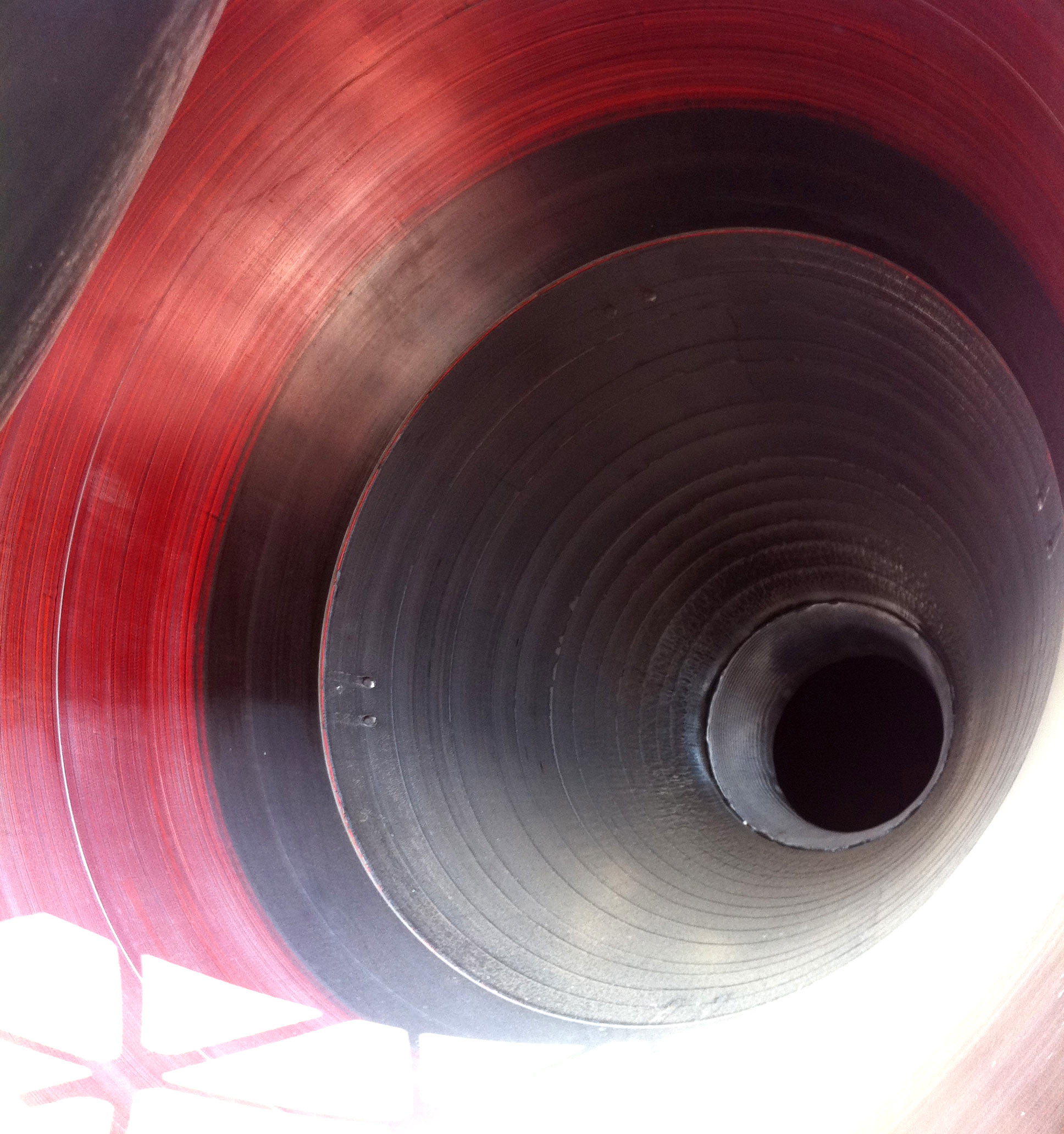 M-Vロケット第二段ノズル内部